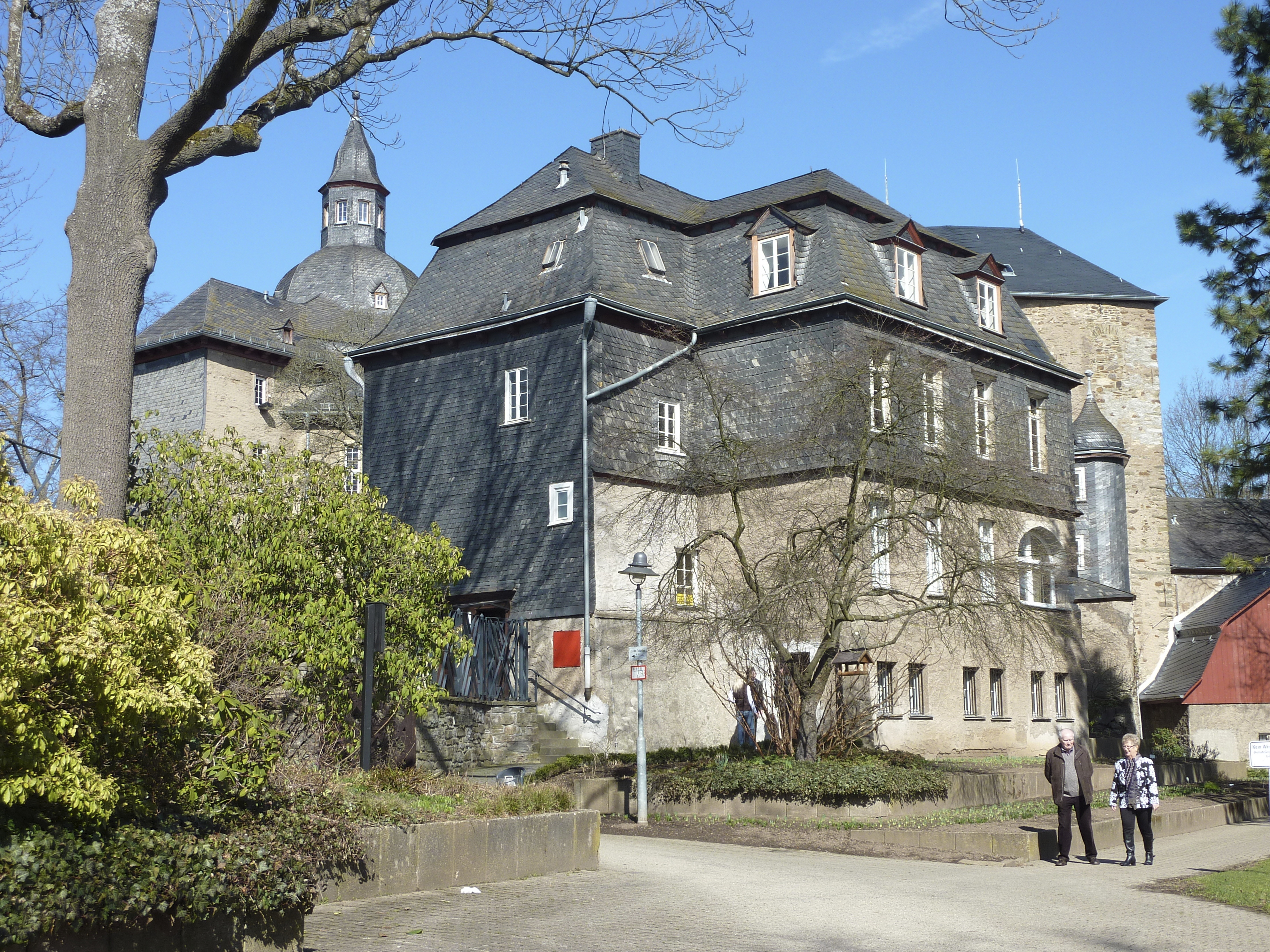 Oberes Schloss in der Stadt Siegen in Nordrhein-Westfalen, Bundesrepublik Deutschland: Die Kernburg, gesehen aus dem Schlosspark von Südosten